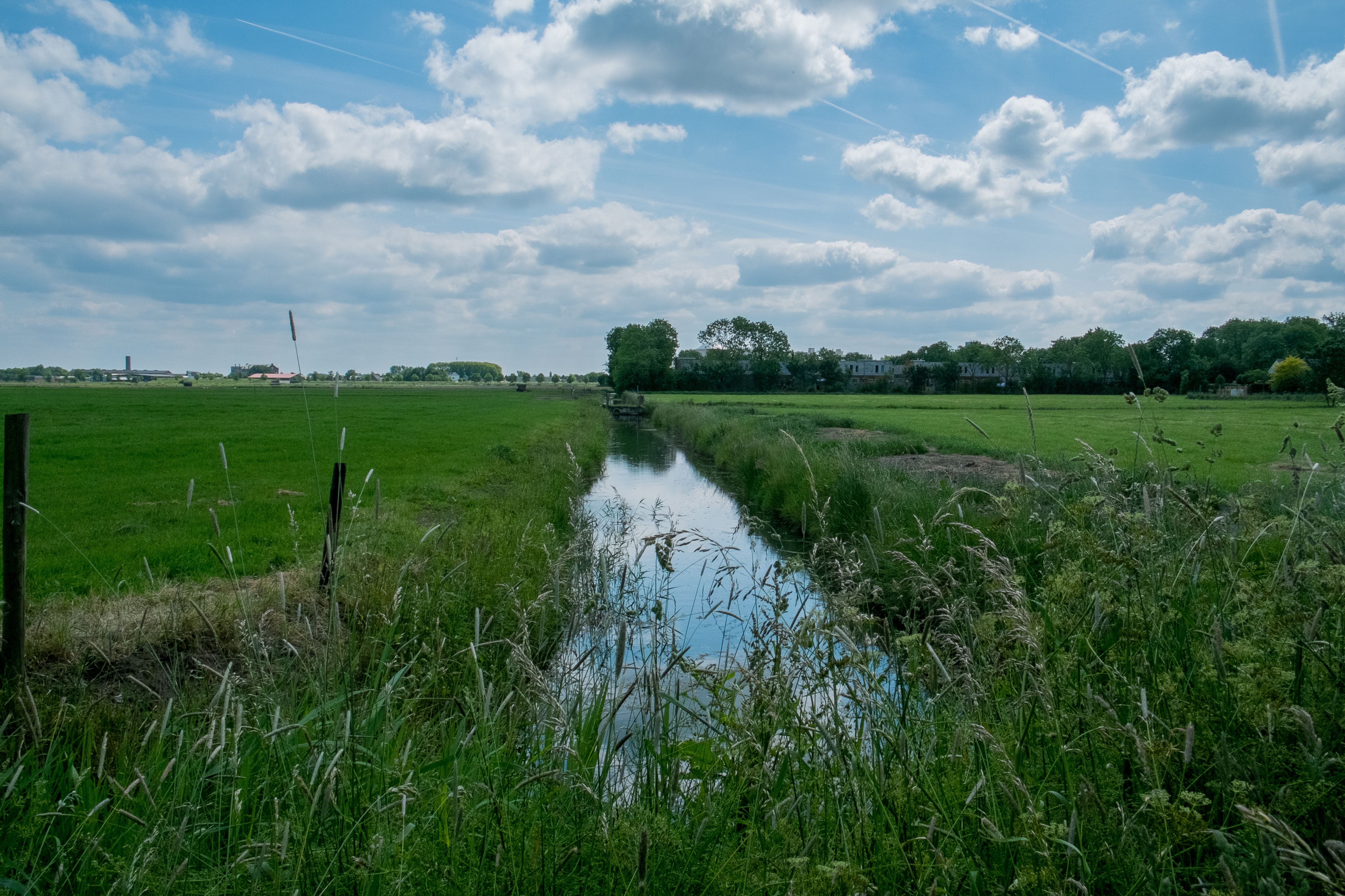 Restant van de Oude Maar, Klief(t)diep of Oude Tocht, een gegraven waterloop door het landschap van Leegkerk